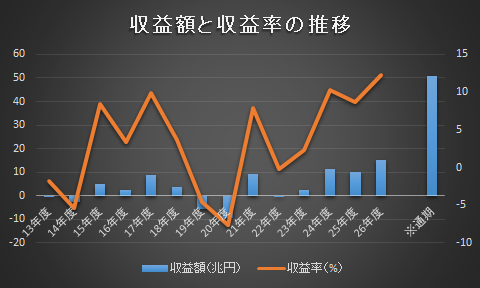 GPIFの運用実績 市場運用開始以降（平成13年度～平成27年度第3四半期）